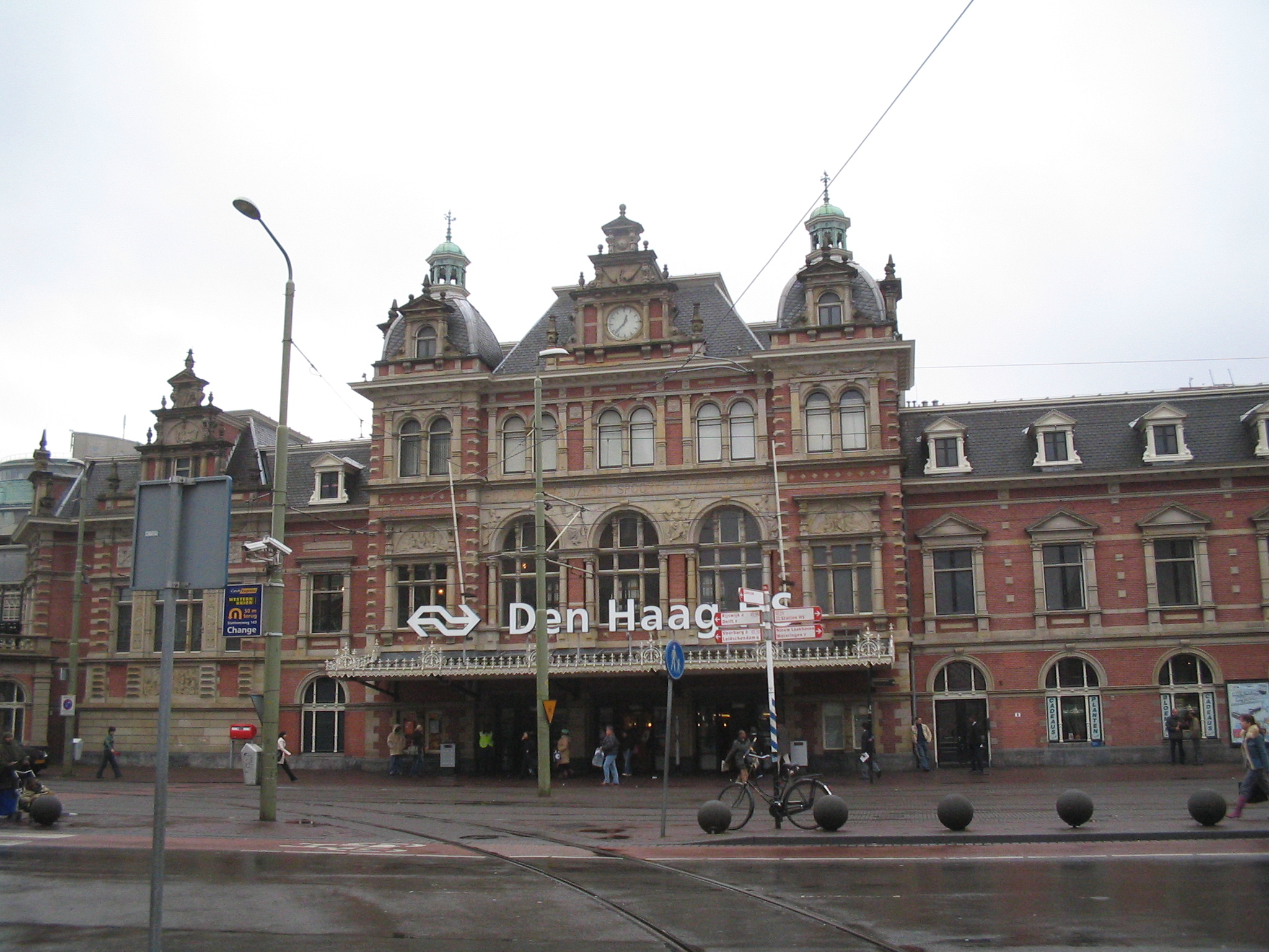 Station Den Haag HS, Netherlands, 21 oktober 2005